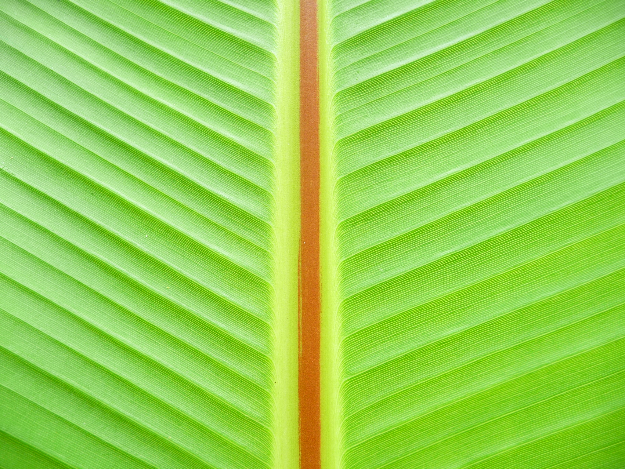 Detailaufnahme von Blattstil und Blattspreite einer unbestimmten Banane (Musa)